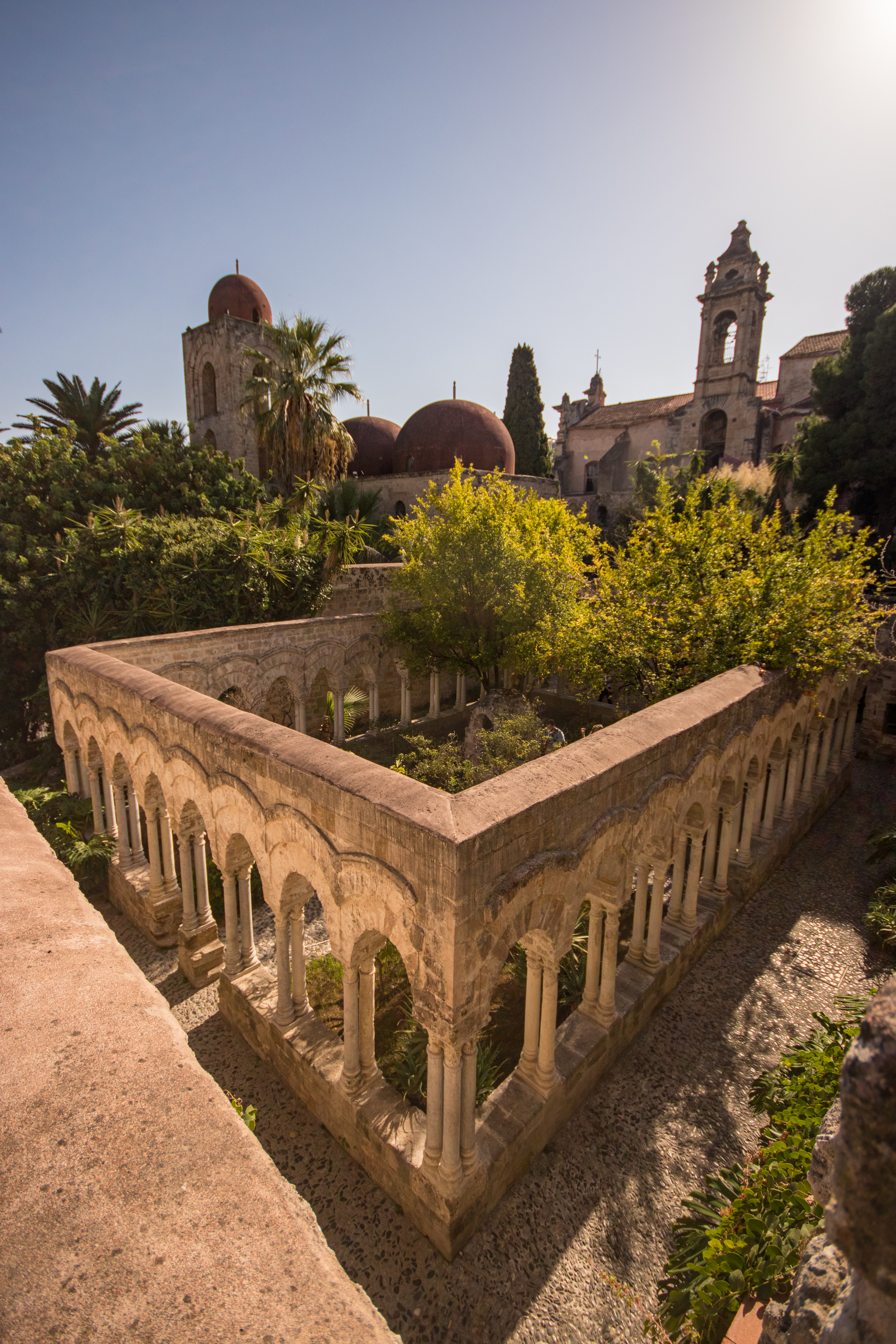 San Giovanni degli Eremiti (Palermo) - Cloister and gardens